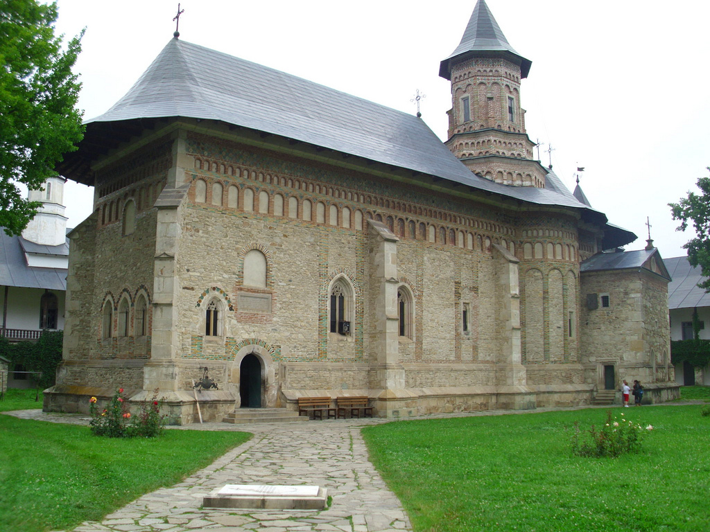 Minastirea Neamt